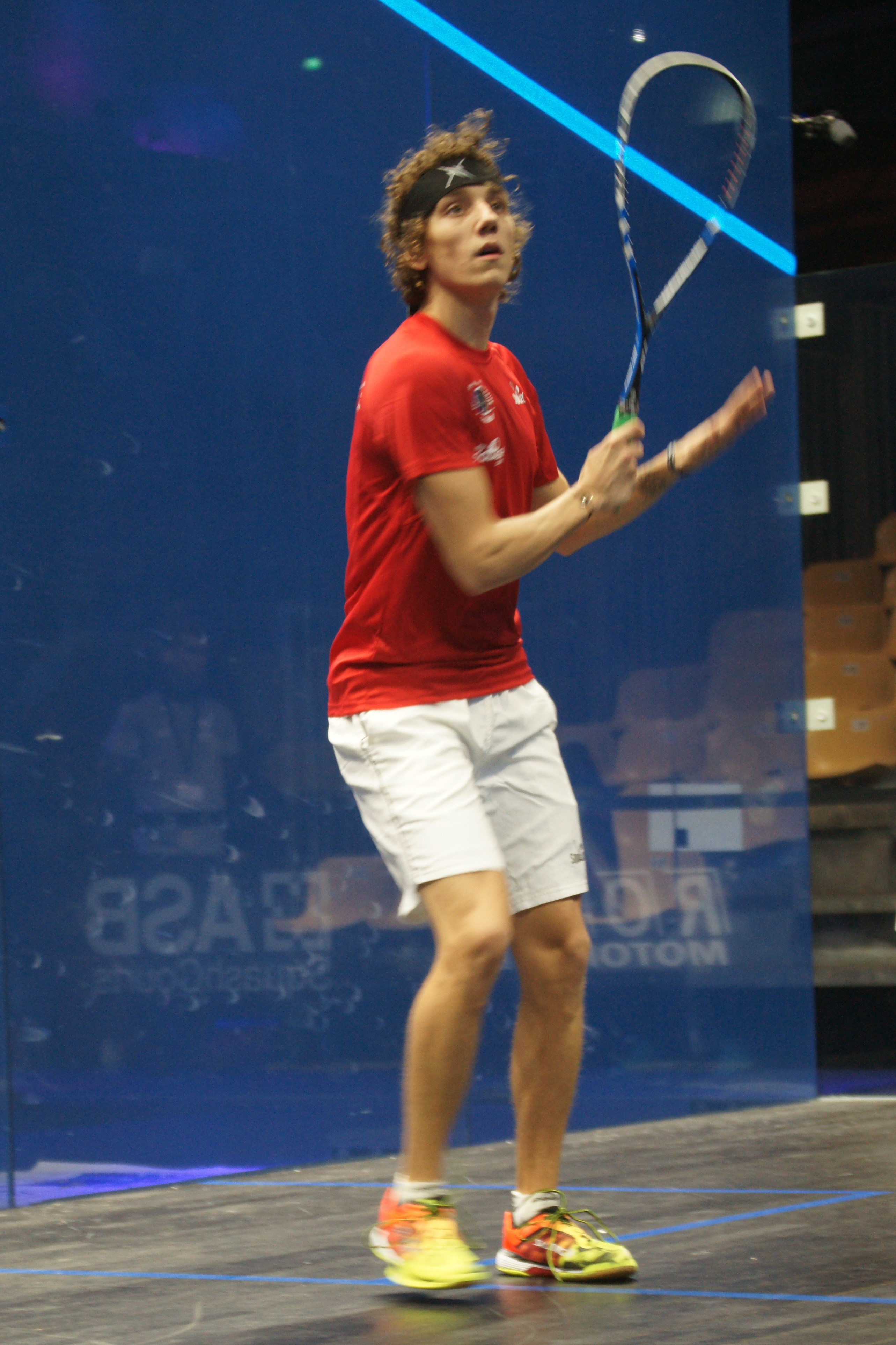 championnats du monde de squash par équipe Marseille 2017